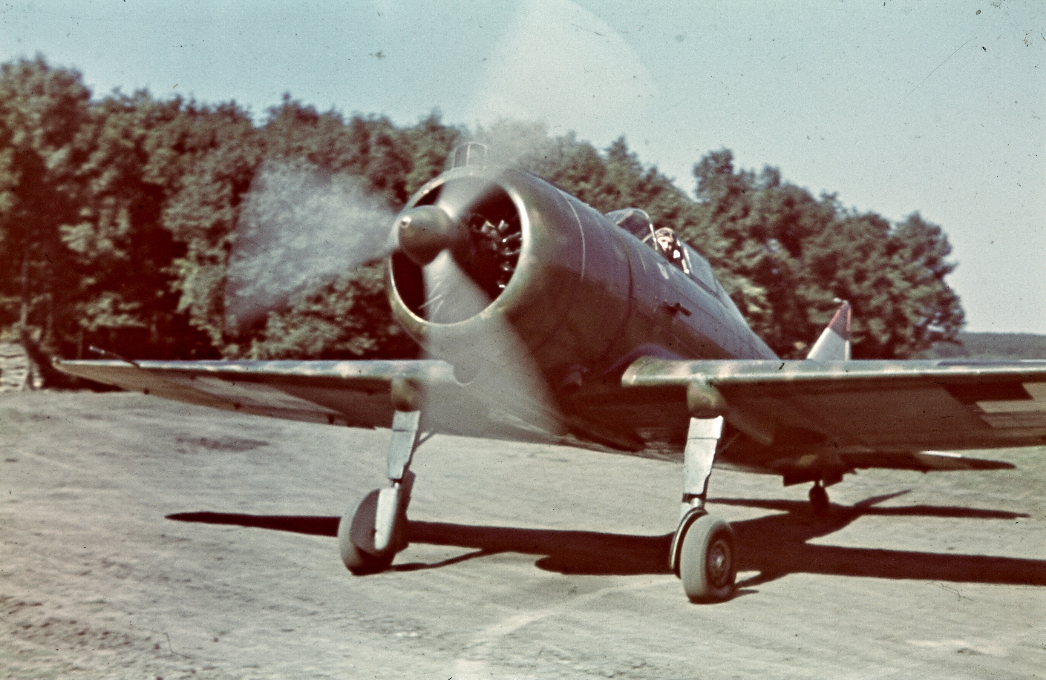 Magyar Királyi Honvéd Légierő Reggiane Re-2000 Falco (Héja) típusú vadászgépe. Tags: colorful, Royal Hungarian Air Force, airplane, second World War, transport, Italian brand, fighter plane Title: Magyar Királyi Honvéd Légierő Reggiane Re-2000 Falco (Héja) típusú vadászgépe.